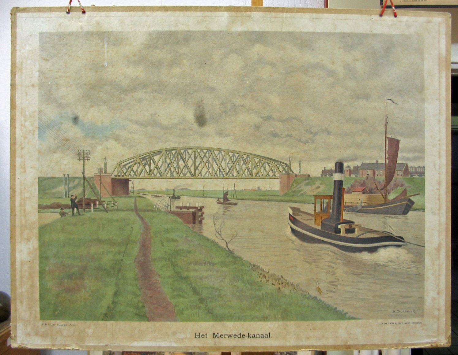 Het Merwede-kanaal, schoolplaat van uitgeverij Wolters-Noordhoff